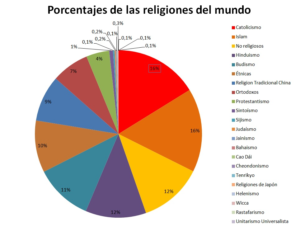 Porcentaje de religiones del mundo, actualizado abr 2018 / World religions